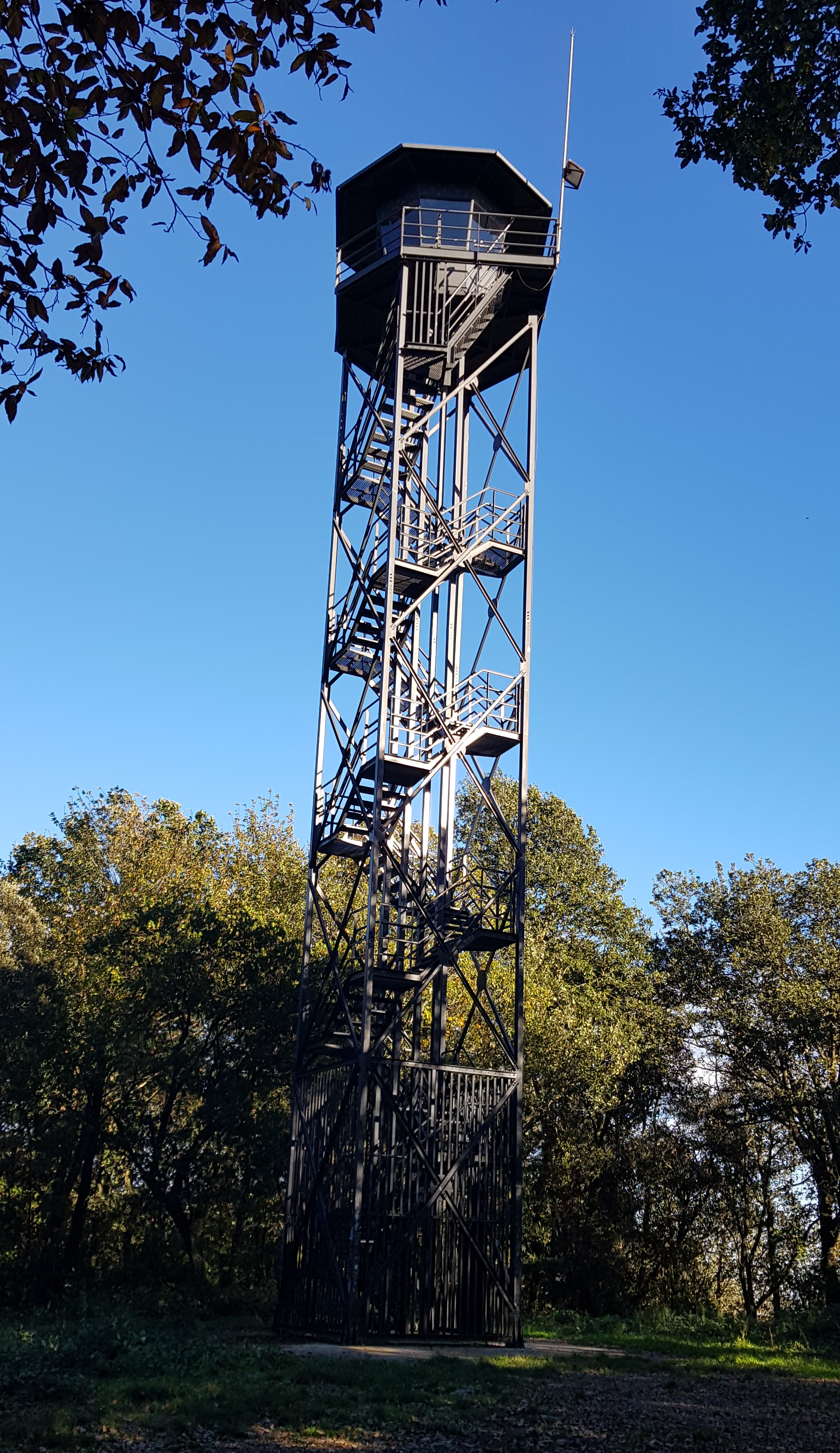 Torre del Turó Gros del Montnegre.